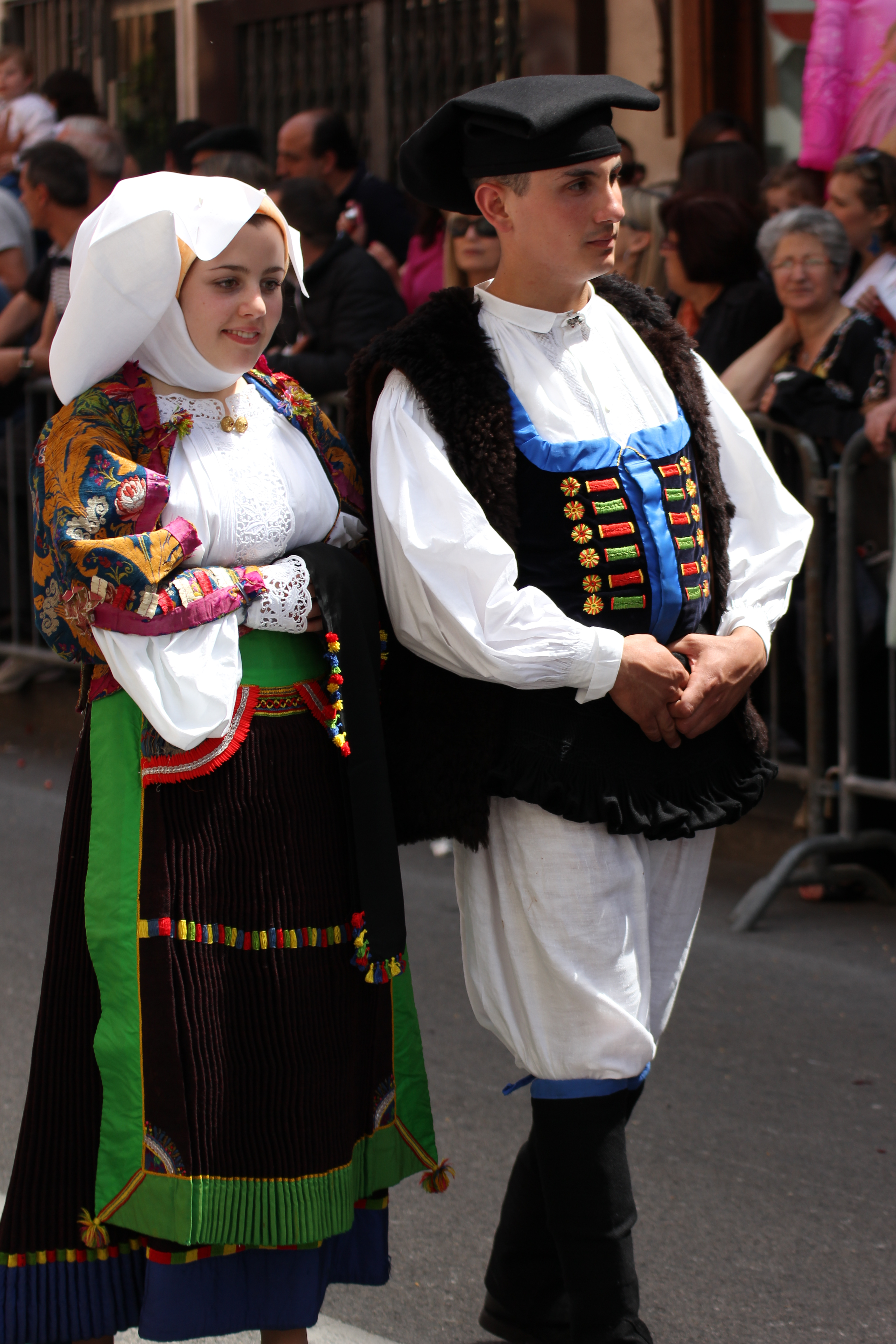 Costume tradizionale